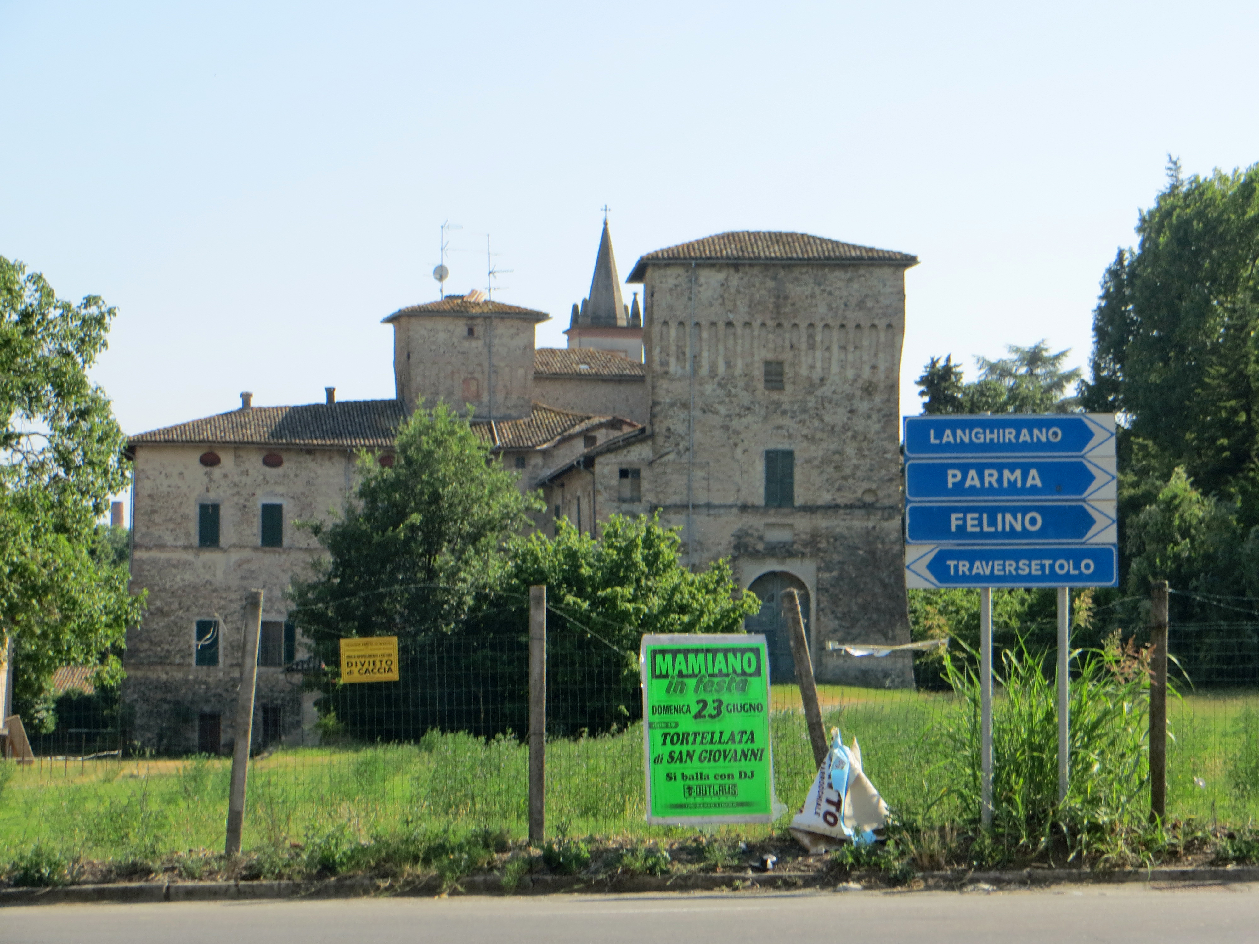 Castello (Panocchia, Parma) - lato nord